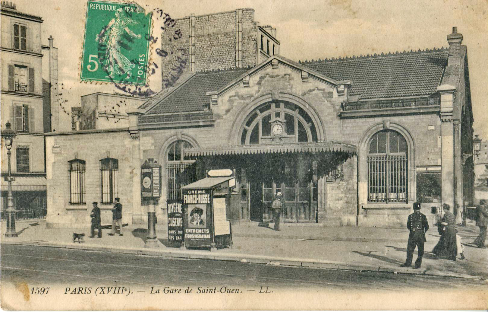 Carte postale ancienne éditée par LL, n°1597 : PARIS (XVIIIe) - La Gare de Saint-Ouen